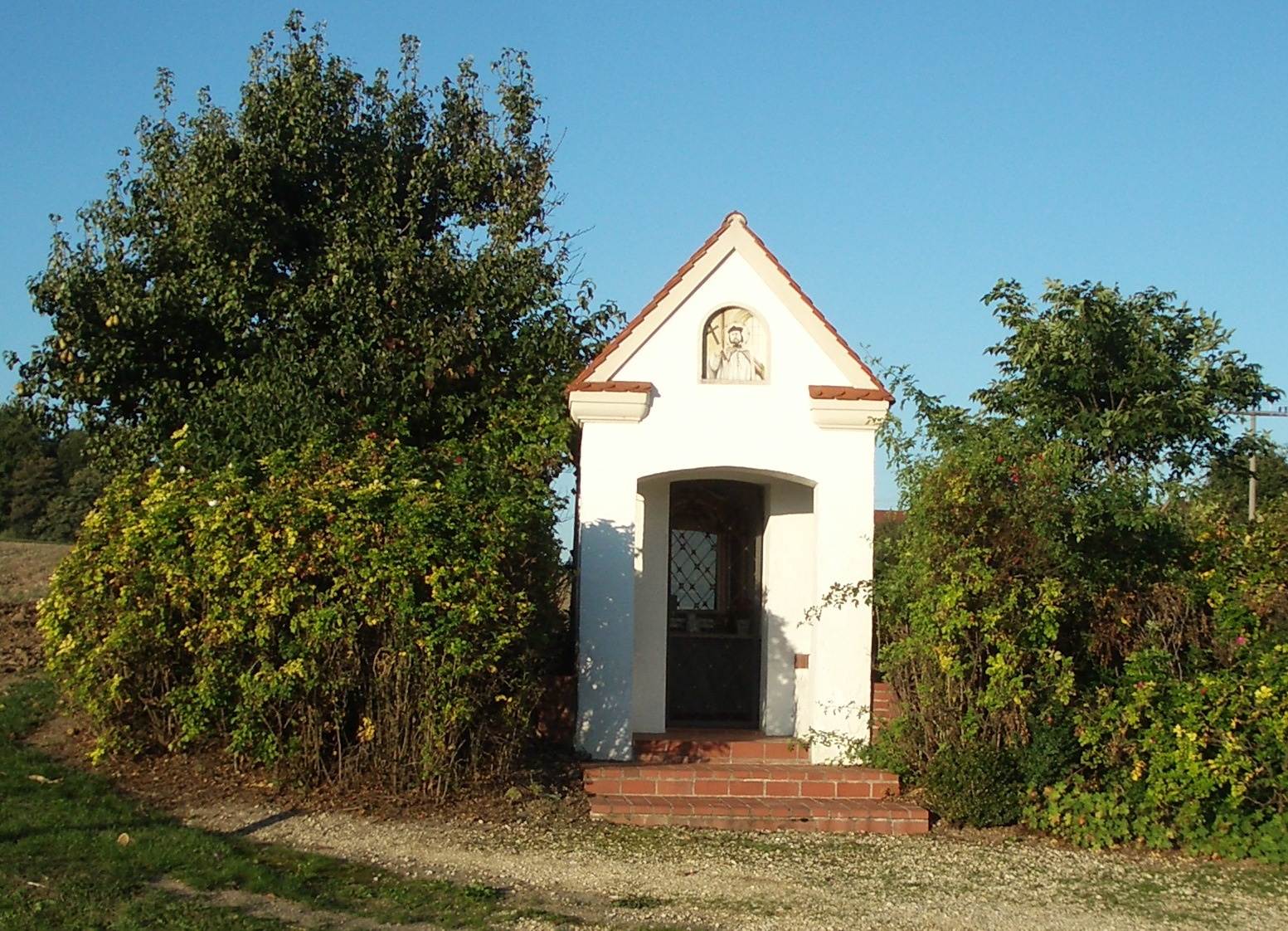 Feldkapelle aus dem 18. Jahrhundert südlich von Silheim Bibertal an der Straße nach Großkissendorf.This is a photograph of an architectural monument.